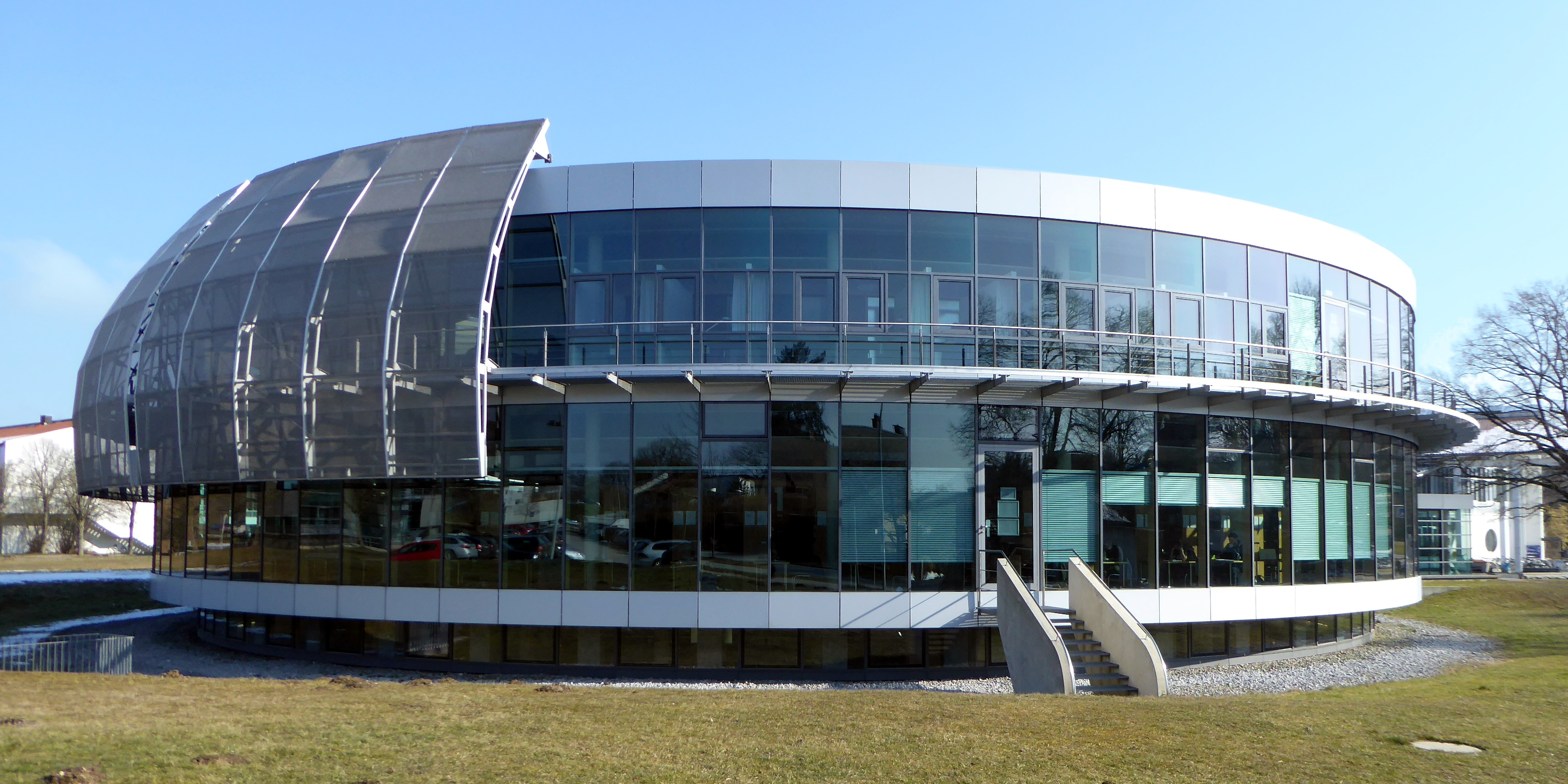 Freising-Weihenstephan, Bibliothek des Wissenschaftszentrums, mit beweglichem Sonnenschirm.